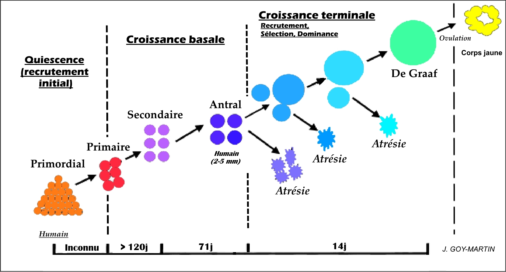 Folliculogénèse complète, primordial, primaire, secondaire, antral, De Graaf, Corps jaune